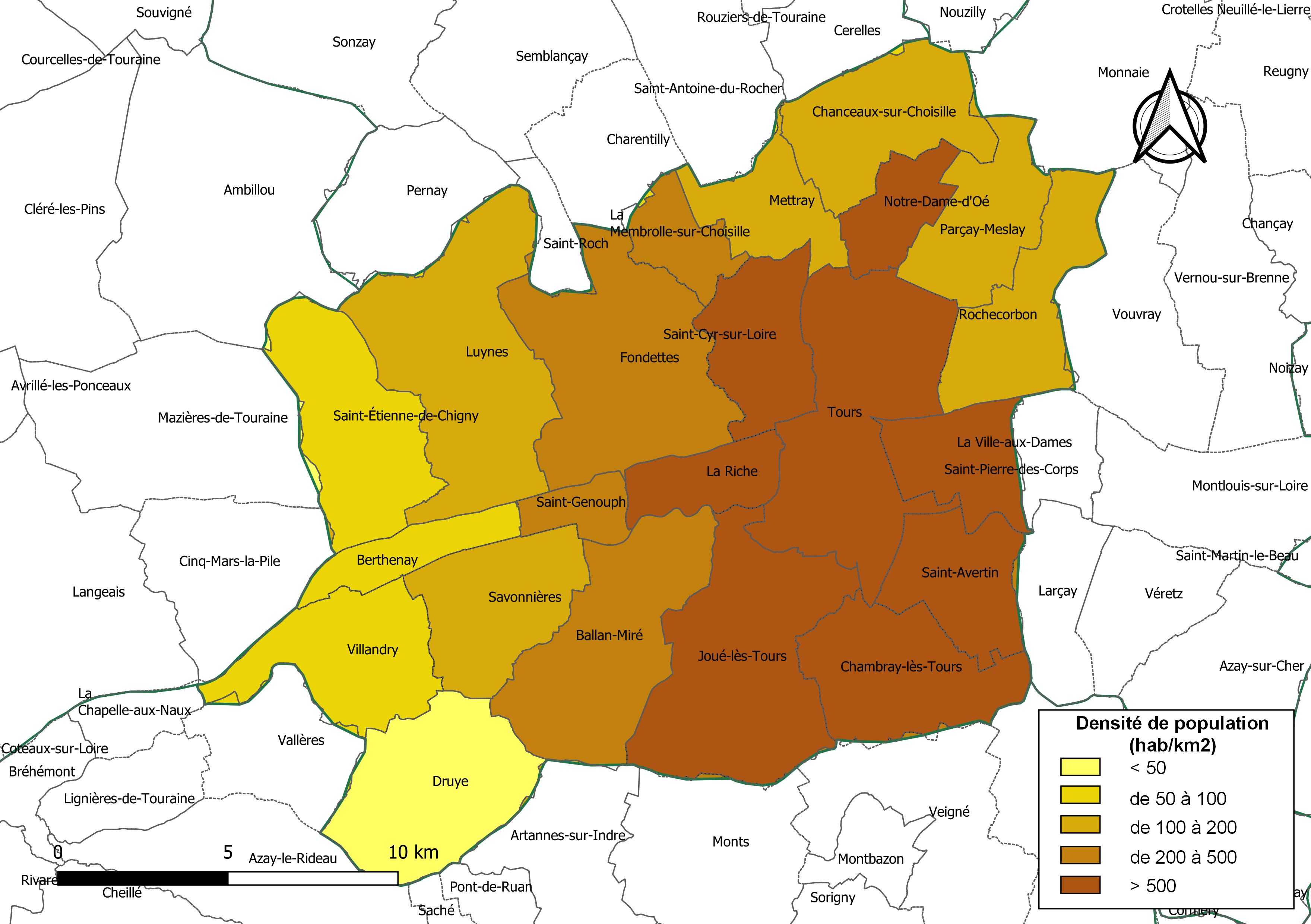 Carte des densités de population (millésimée 2016) des communes de la communauté de communes l'intercommunalité Tours Métropole Val de Loire, département d'Indre-et-Loire, France. Composition au 1er janvier 2019.